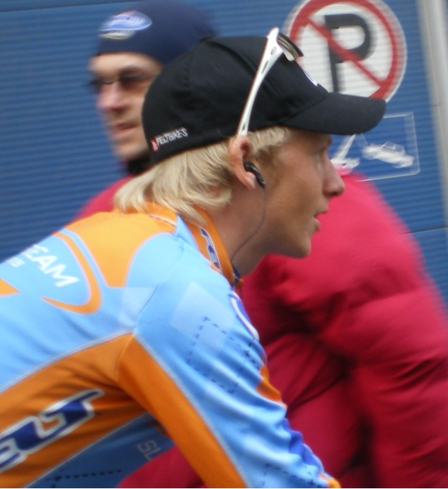 Huub Duyn - Omloop Het Volk 2008